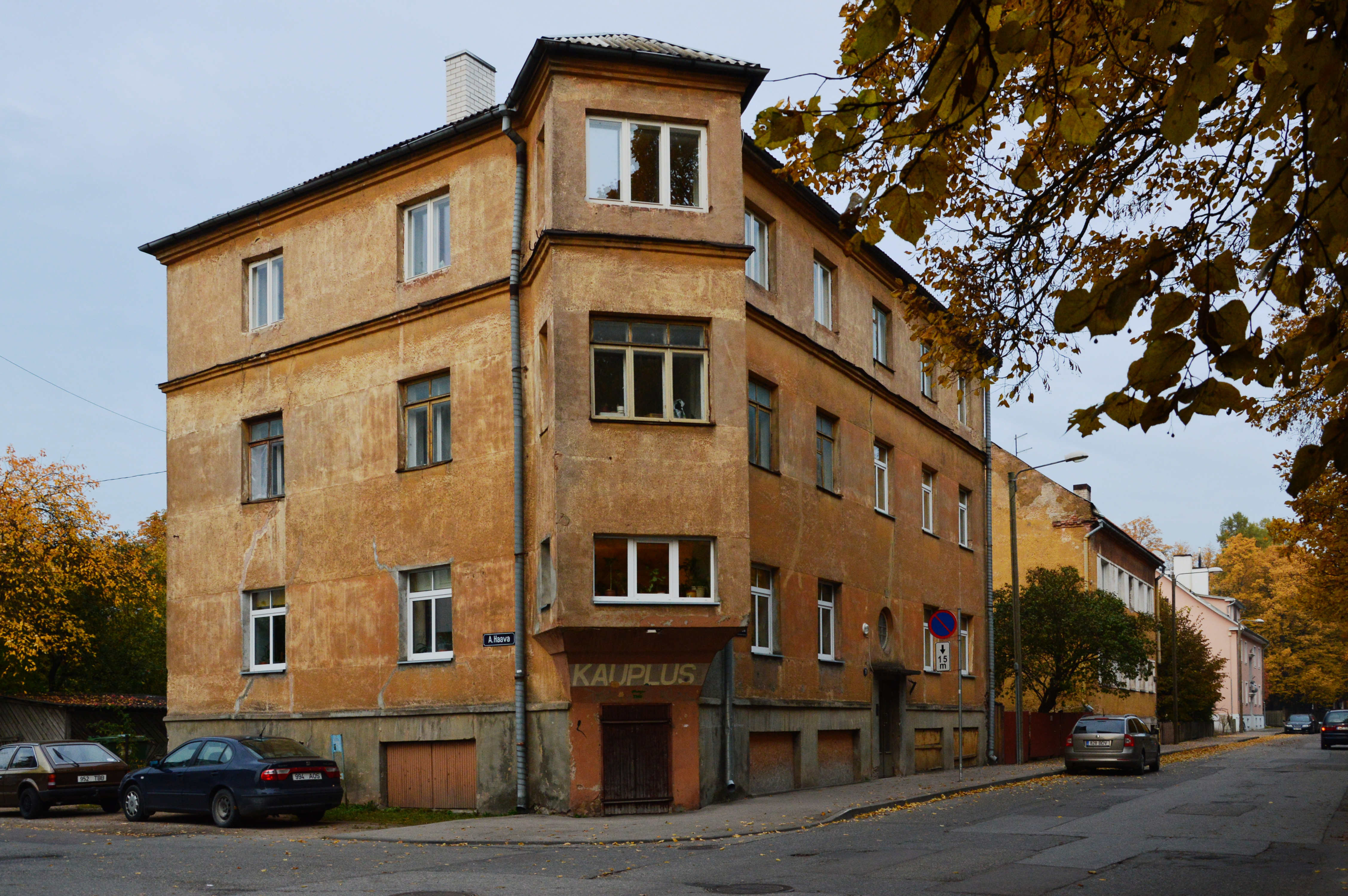 J. Tõnissoni ja A. Haava tänava nurk Tartus